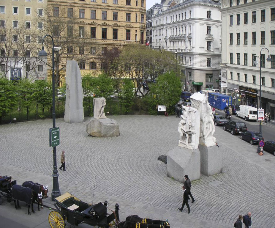 Mahnmal gegen Krieg und Faschismus auf dem Albertinaplatz in Wien